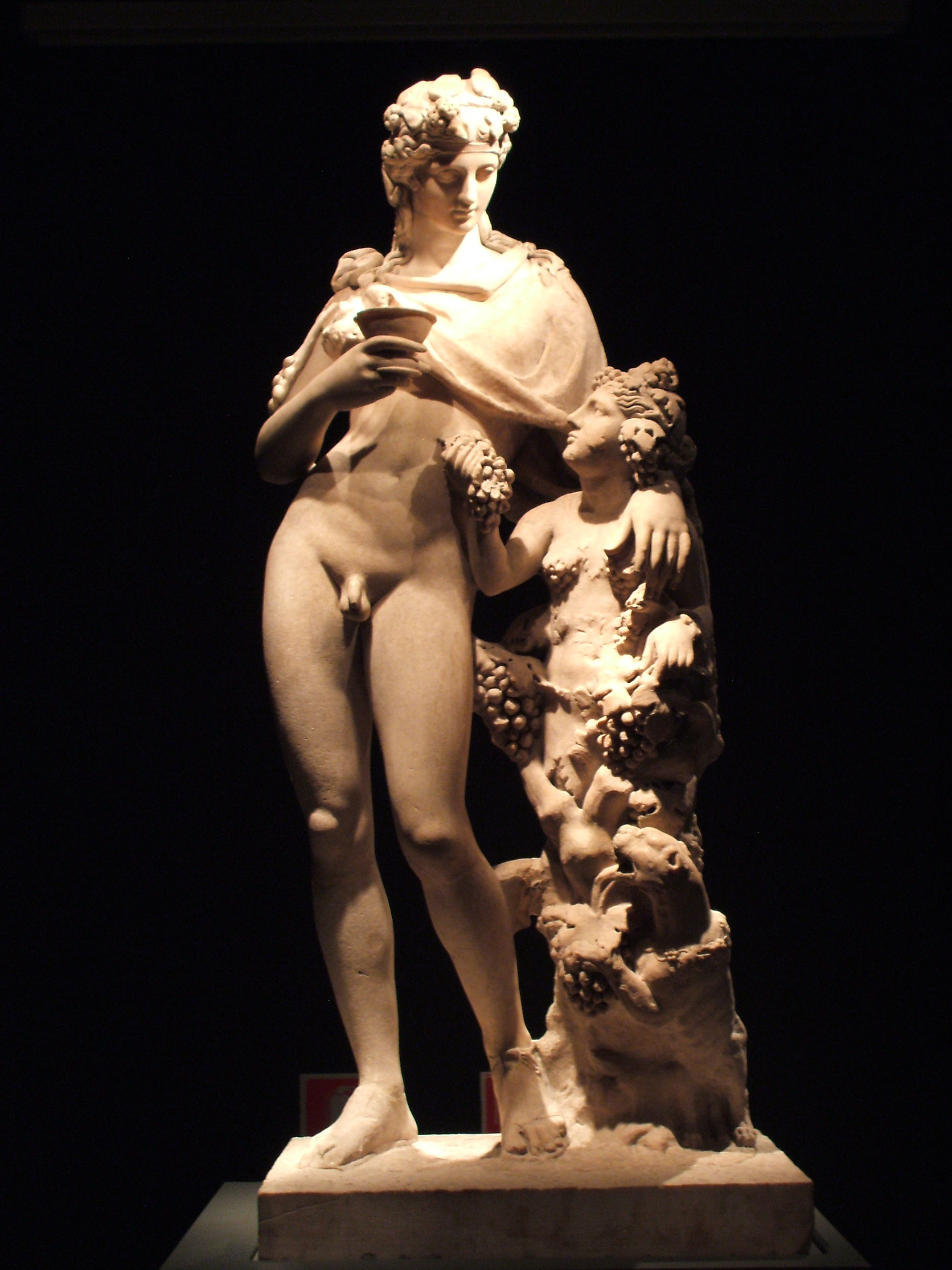 Estatua de mármol de Dionisio con una encarnación antropomorfa del vino, en la exposición La belleza del cuerpo, en el MARQ. Dinioso está representado como un joven afeminado que apoya el brazo izquierdo en el hombro de la encarnación del vino, como figura semihumana sobre la que crecen hojas y uvas. El cuerpo del dios del vino se modeló alargado y esbelto con suaves curvas femeninas, como formulismo tipológico de la época griega de la escultura tardía o «helenística». El brazo que sostiene la copa y otras pequeñas partes están restauradas. Época romana, aproximadamente del 150-200 d. C. Tal vez basada en un original griego del siglo II. a. C. Procedente de La Storta, Italia. Medidas: 1580 mm x 680 mm x 390 mm. GR 1805.0703.1 (Escultura 1636).